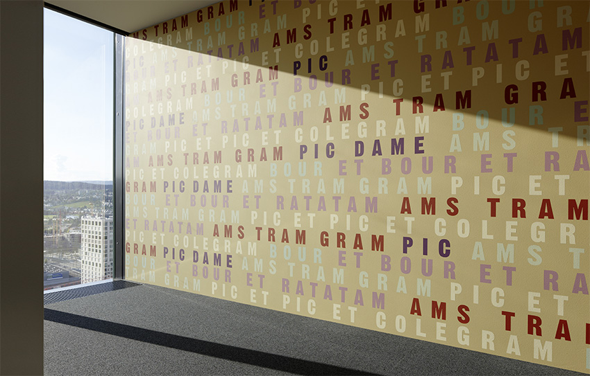 Hans Danuser, Piff Paff Puff, 2010/2011, Ein Kunst-in-Architektur-Projekt im Prime Tower in Zürich, Stock 29